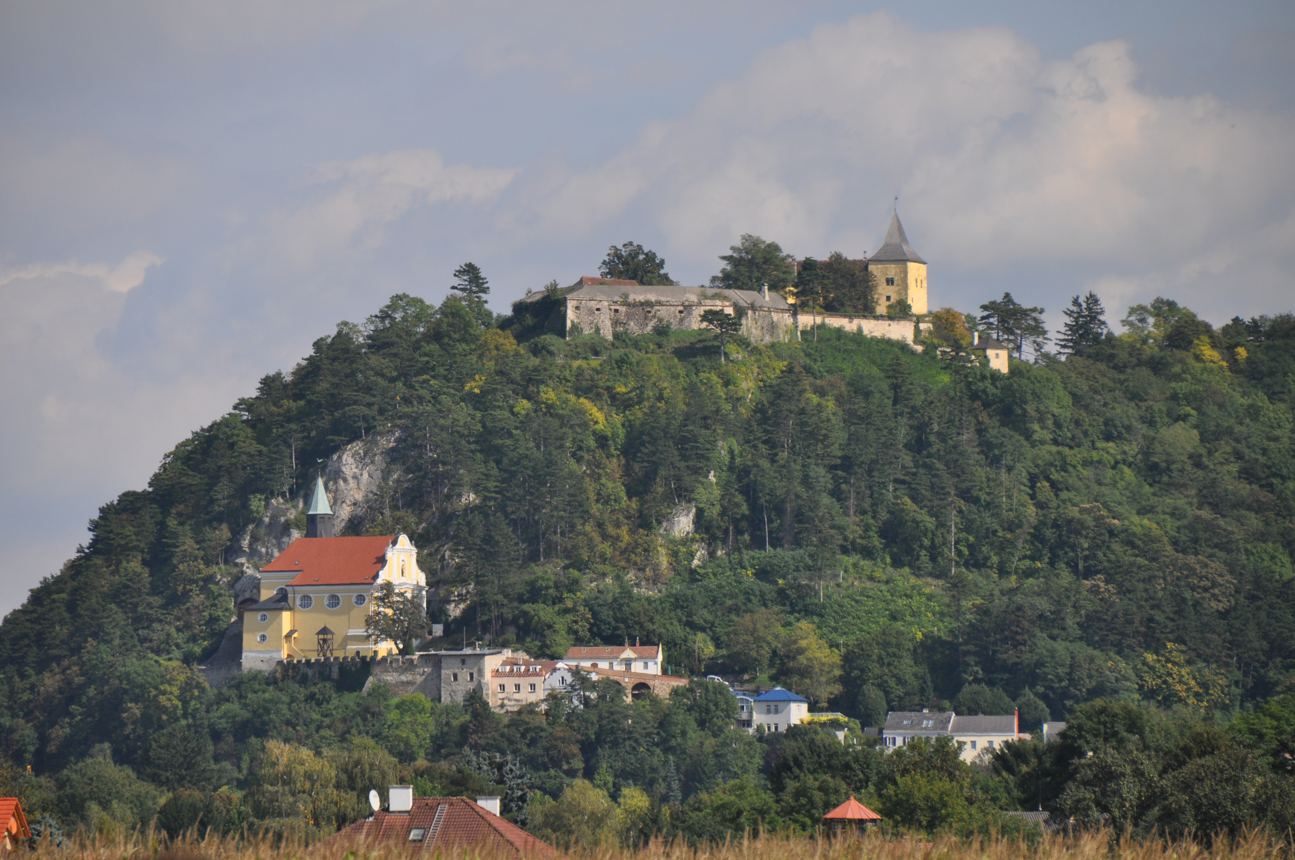 Burg Pitten und Bergkirche Pitten.